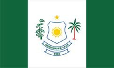 Bandeira de Ouricuri - PE.